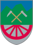 Raggal, Vorarlberg: Quergeteilter Schild mit blauem Schildhaupt. Oben eine grüne, mehrspitzige Bergkette, belegt mit einem silbernen Bergwerkszeichen, Schlegel und Hammer mit goldenen Stielen. Unten in Silber ein halbes rotes Mühlrad. (Verleihung: 28. September 1965)